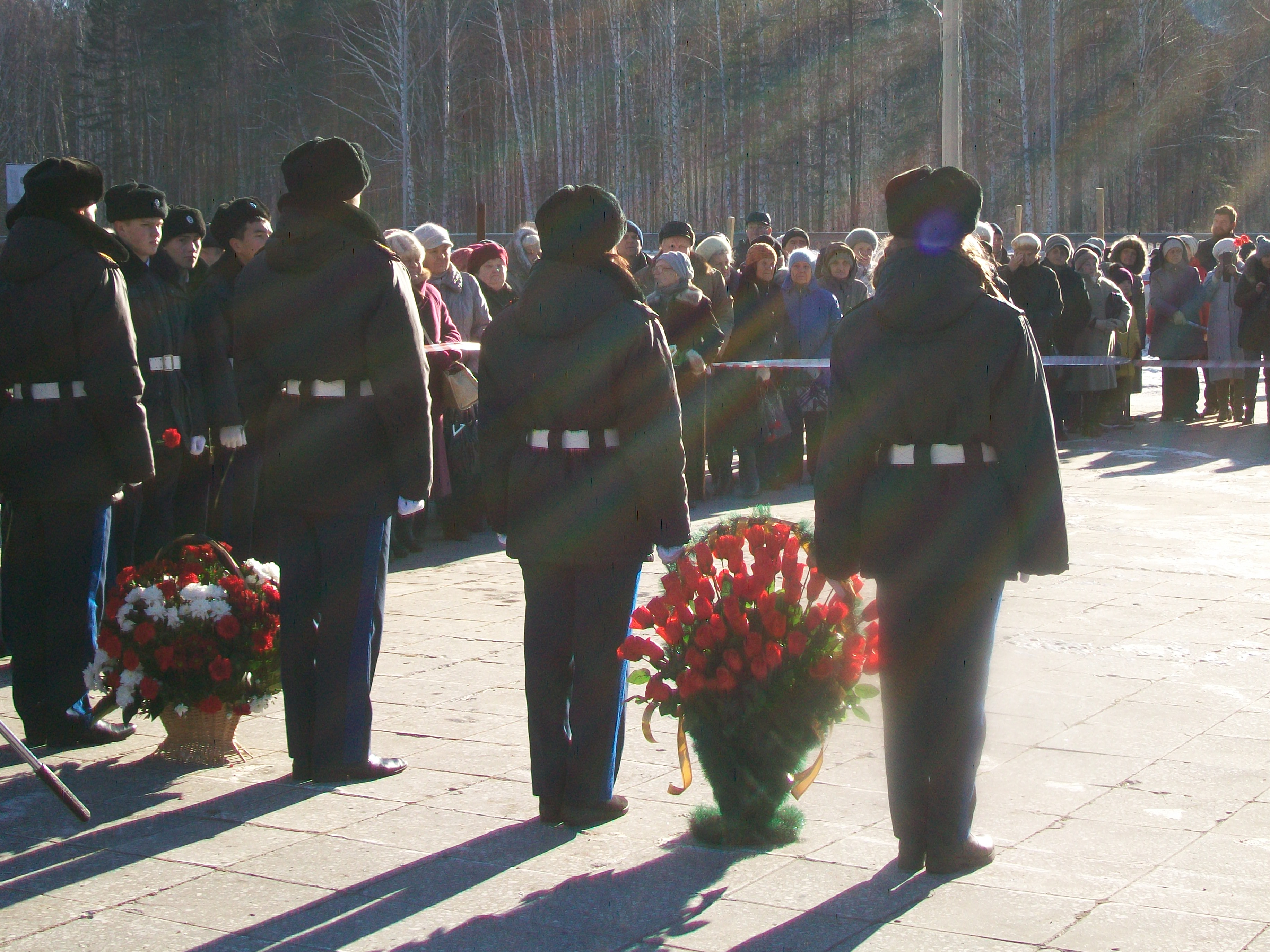 Полицейские перед возложением цветов к мемориалу жертв политических репрессий. 12-й километр Ново-Московского тракта под Екатеринбургом. 29 октября 2017 года